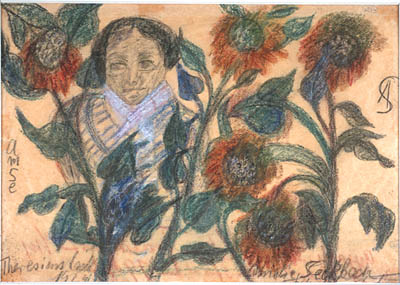 Amalie Seckbach Portrait of a Woman among Sunflowers. Gemalt 1944 in der Haft im Ghetto Theresienstadt. Pastell und Wasserfarben auf Zeichenpapier, 21 x 31 cm